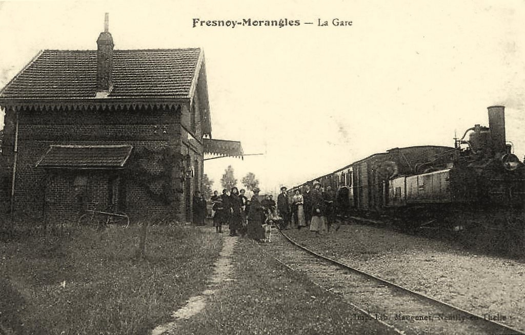 Carte postale de la gare